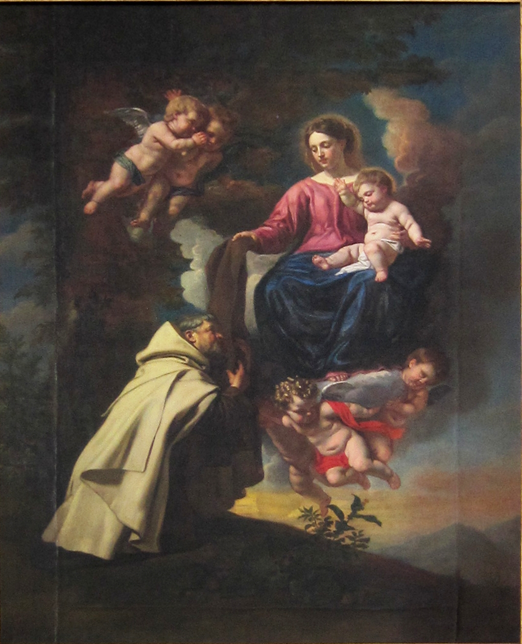 La remise du scapulaire à Saint Simon Stocktitle QS:P1476,fr:"La remise du scapulaire à Saint Simon Stock" label QS:Lfr,"La remise du scapulaire à Saint Simon Stock"